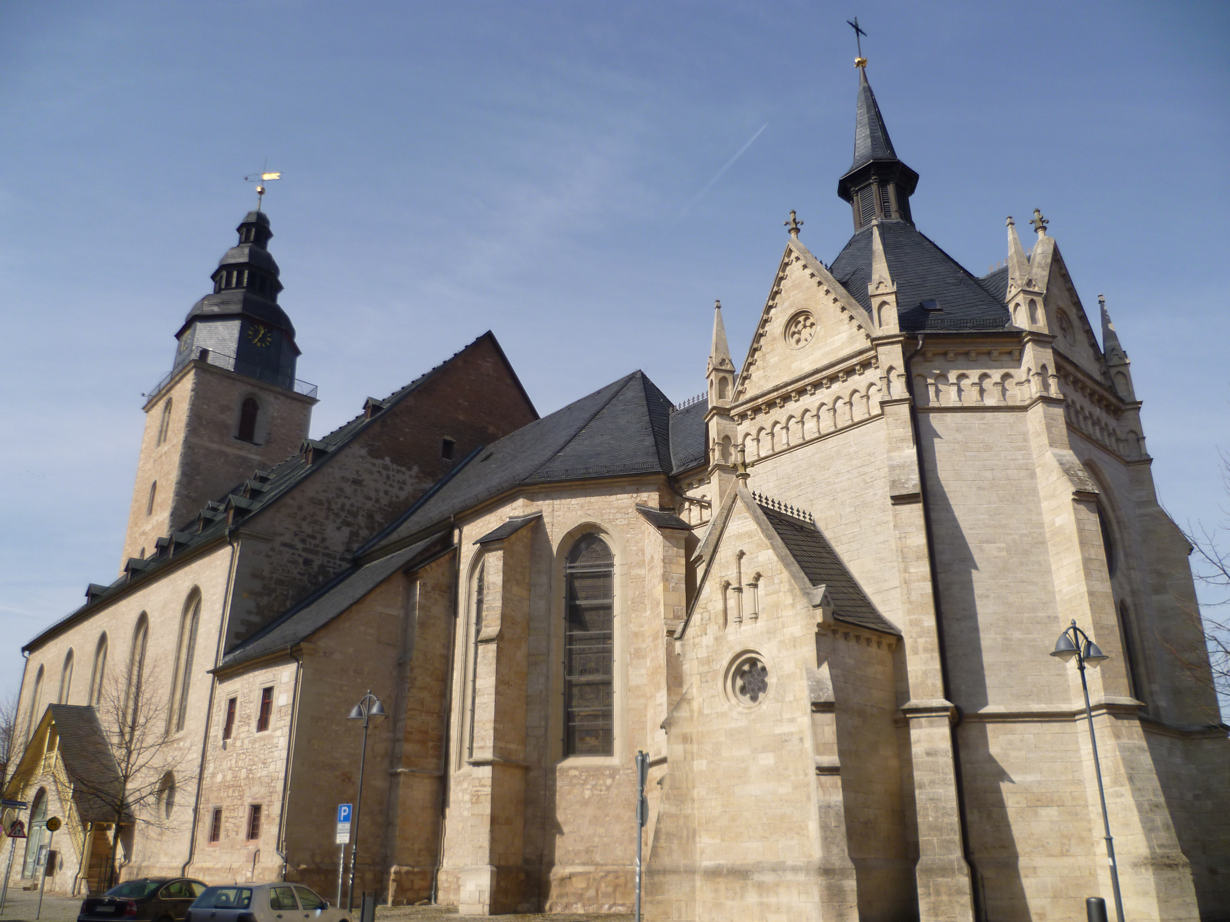 Trinitatiskirche mit Gruft der Fürsten von Schwarzburg-Sondershausen in der Stadt Sondershausen/Thüringen